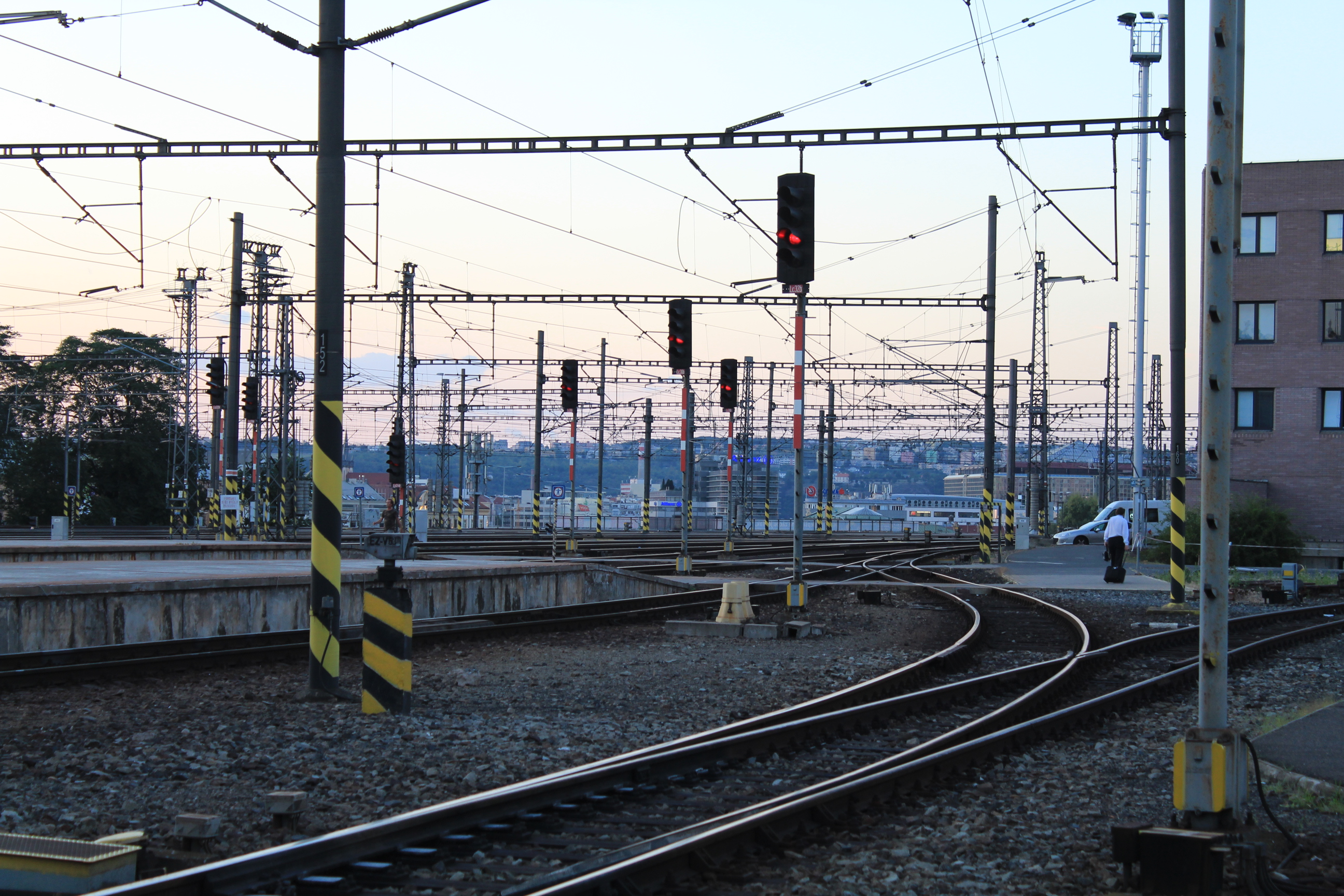 Praha hlavní nádraží severní zhlaví před Novým spojením